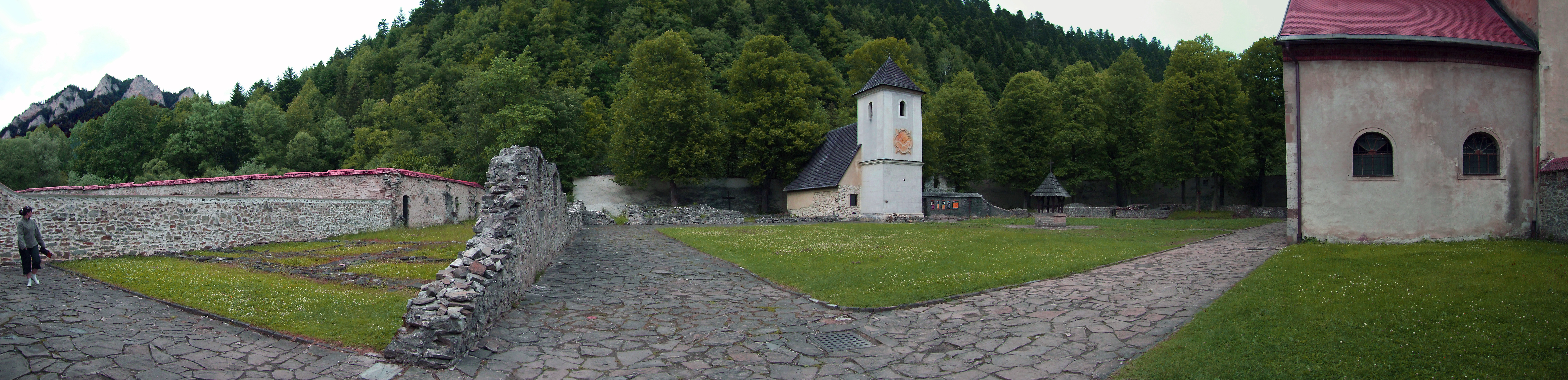 Czerwony Klasztor - panorama